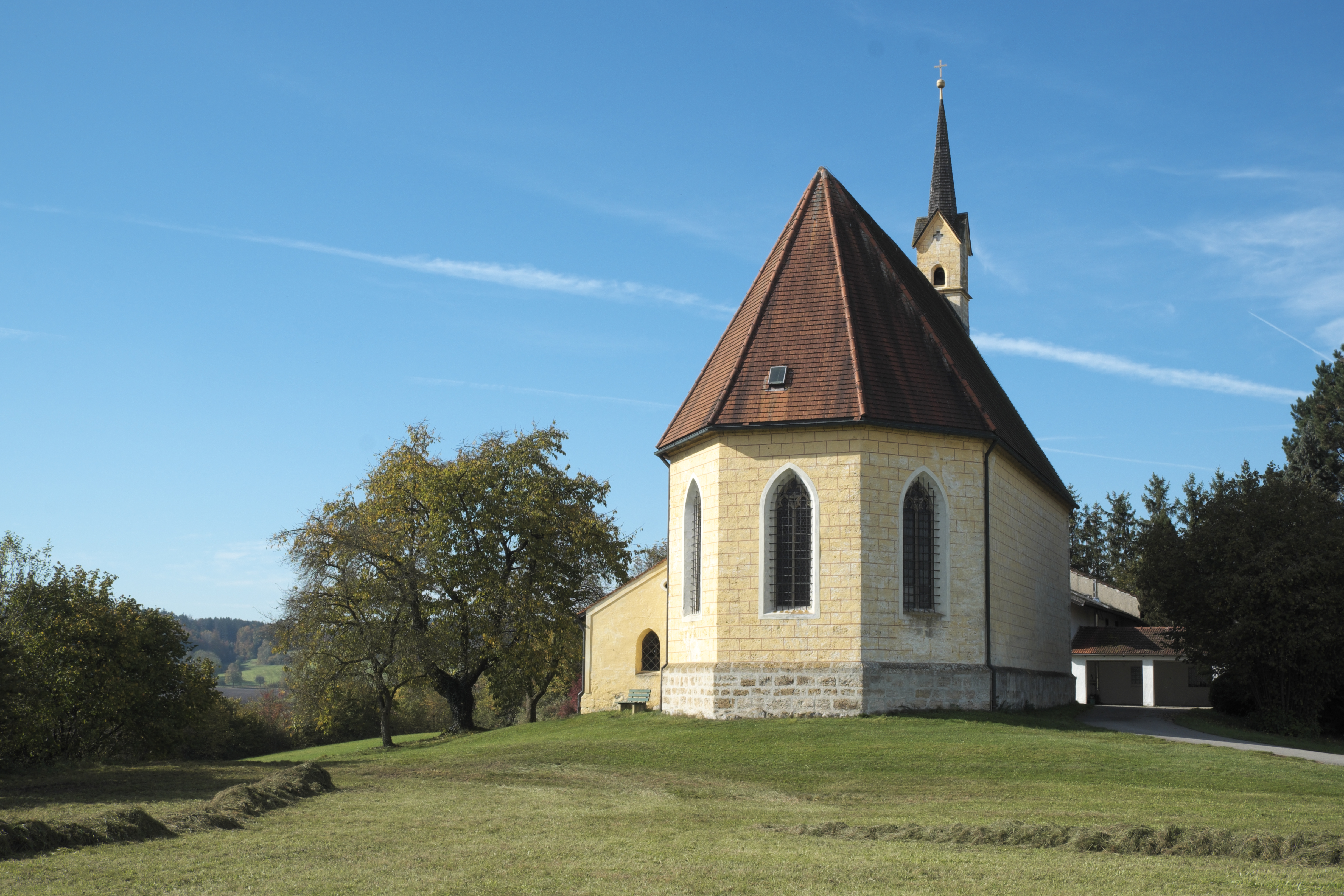 Katholische Filialkirche St. Koloman in Coloman (Taching am See) im Landkreis Traunstein (Bayern/Deutschland), Chor